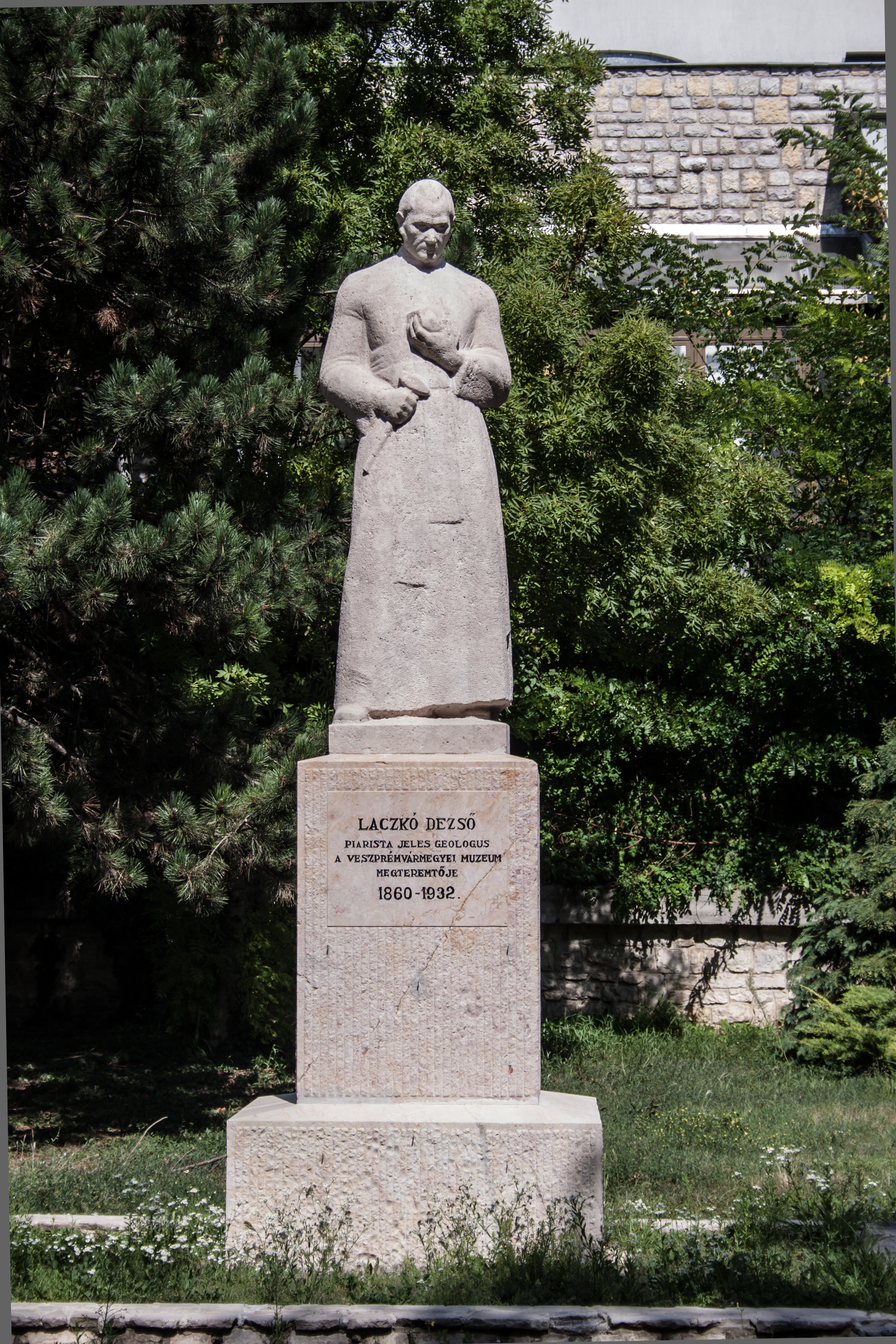 Laczkó Dezső szobra, Veszprém